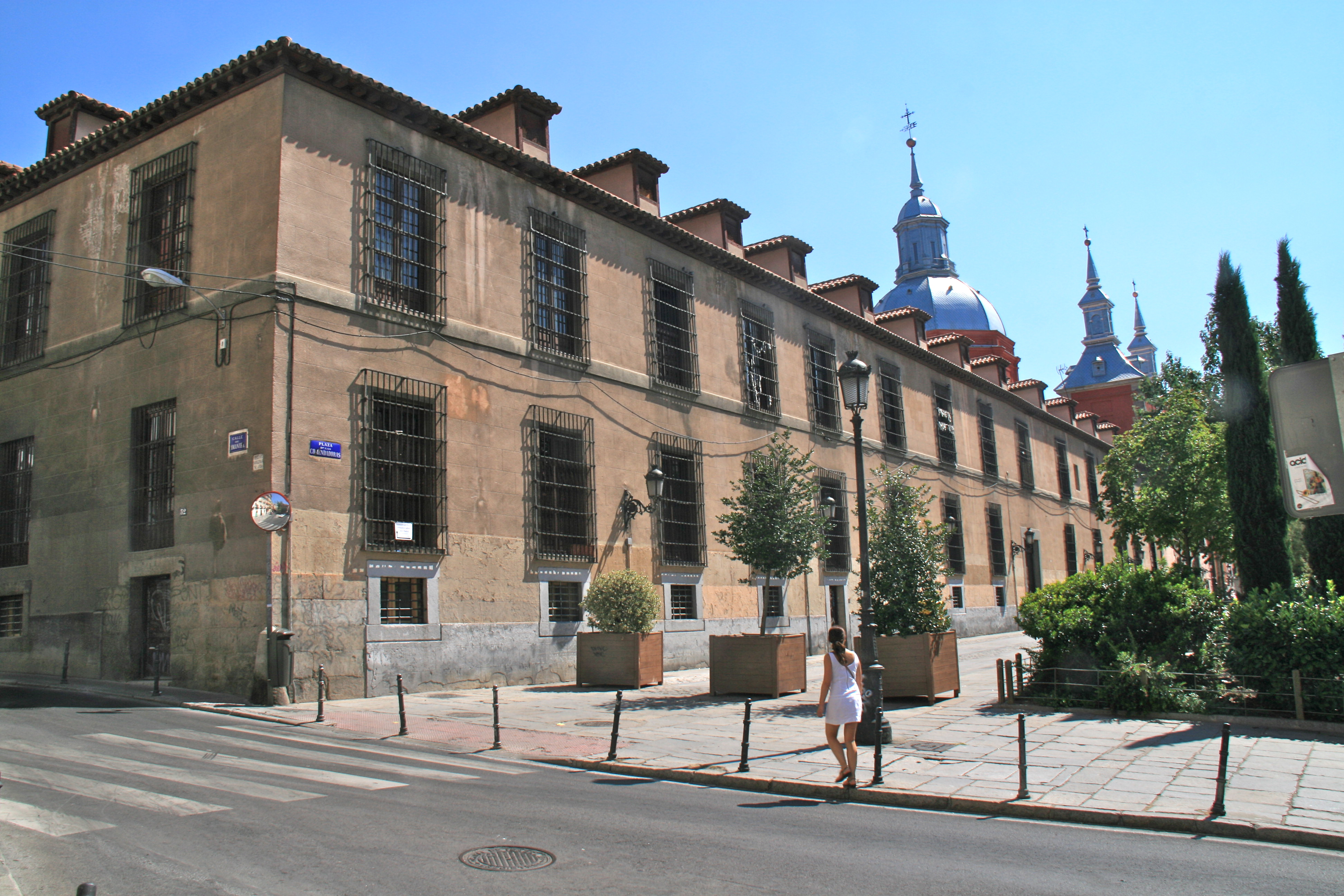 Plaza de las Comendadoras (desde la calle de Amaniel) - Fachada al edificio del Convento de las Comendadoras de Santiago